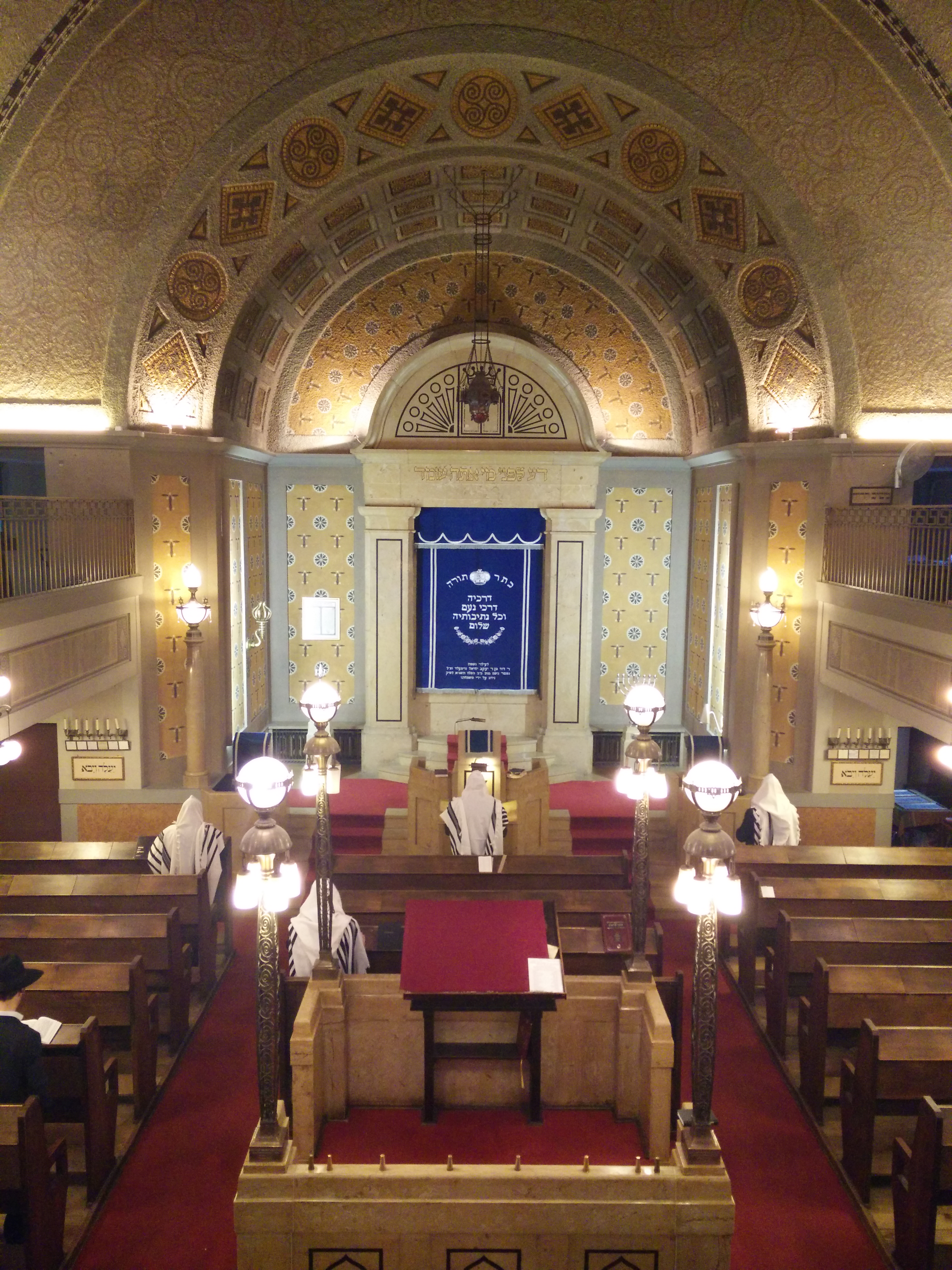 בית הכנסת בלוצרן 1914